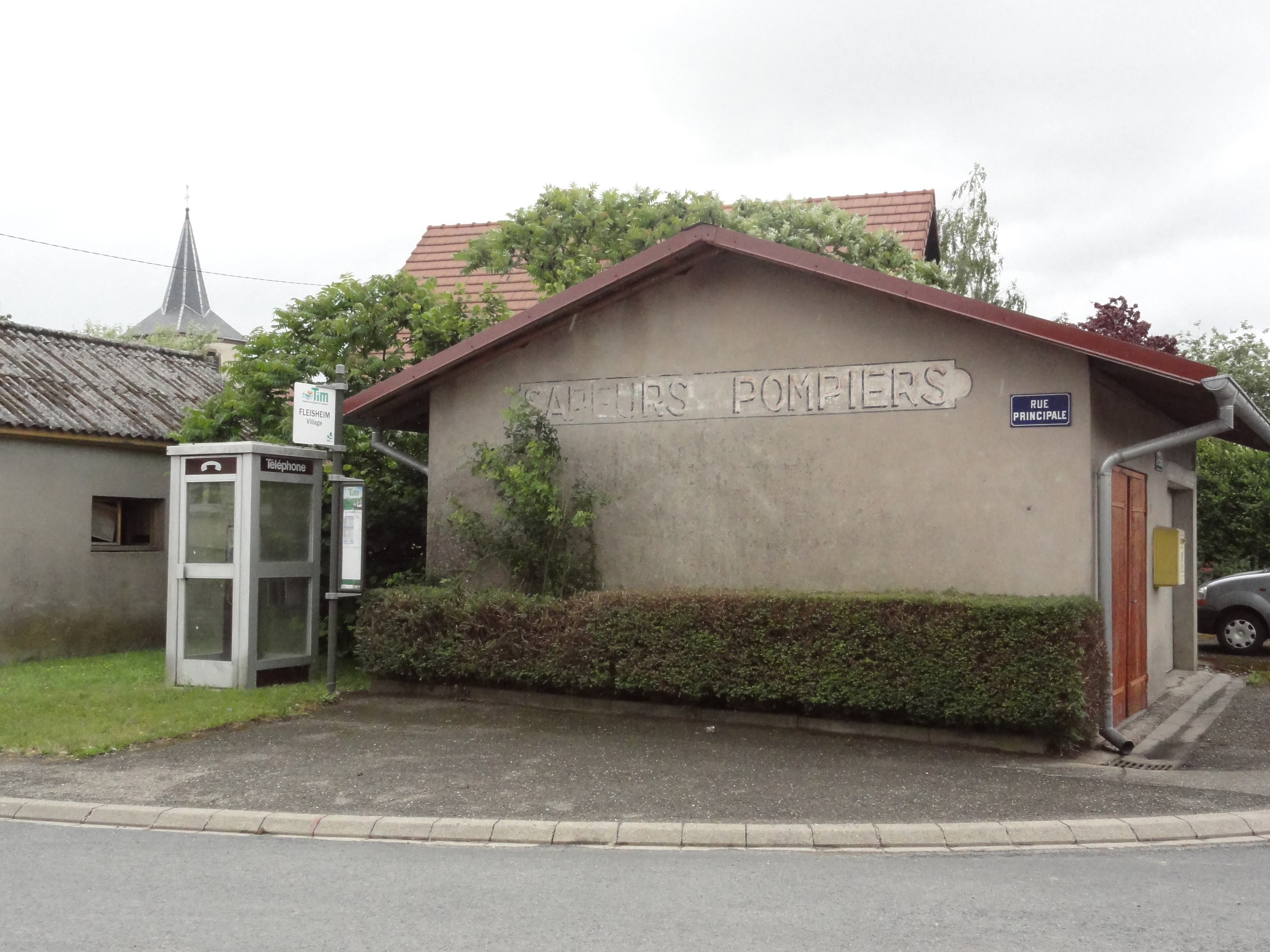 Fleisheim (Moselle) sapeurs-pompiers